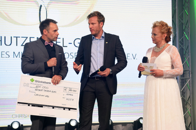 Christian Lell spendet 100.000 Euro aus seinem Privatvermögen an den Mukoviszidose Selbsthilfe e.V.